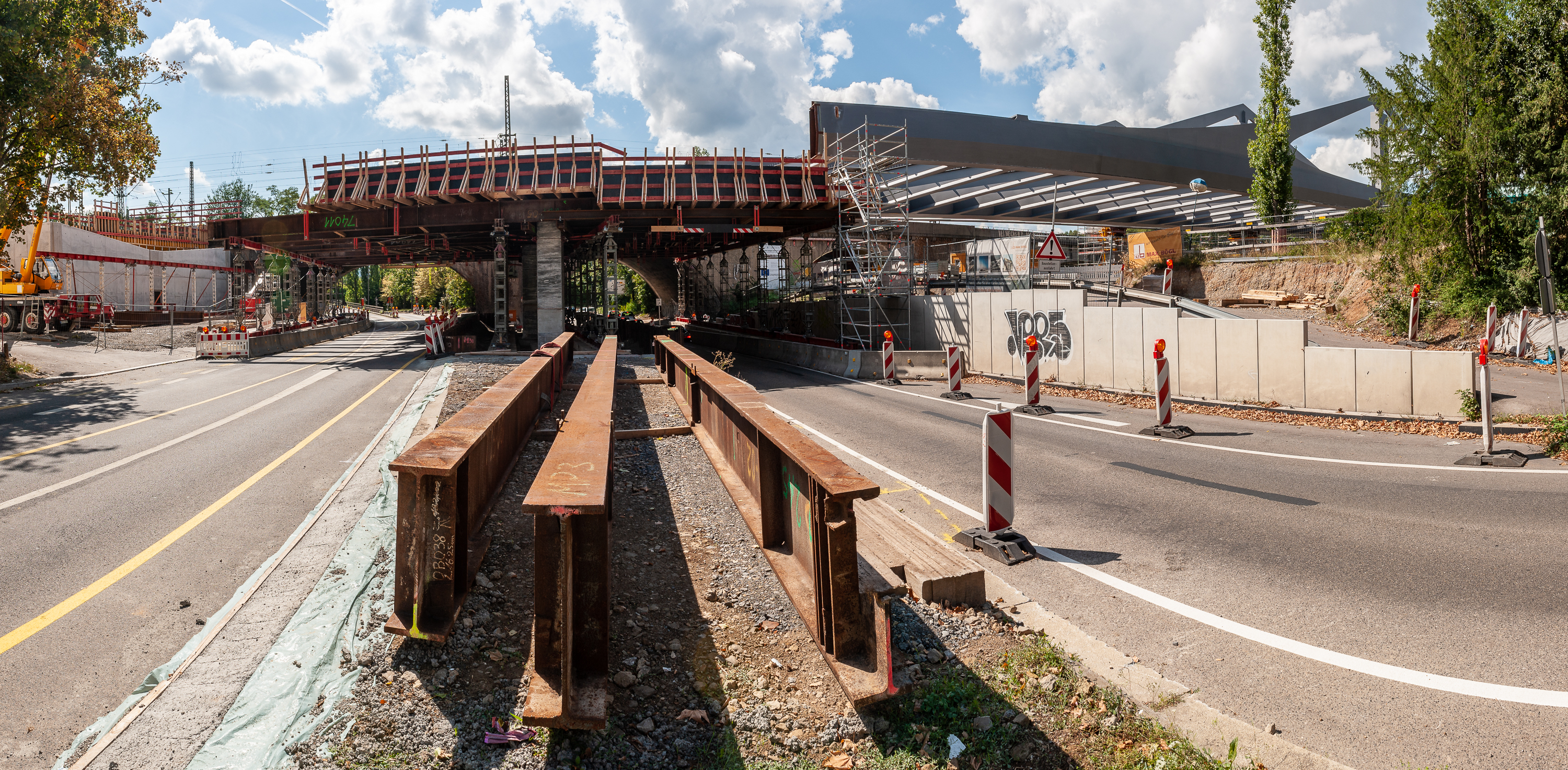 Neue Neckarbrücke Stuttgart, Bauzustand August 2018